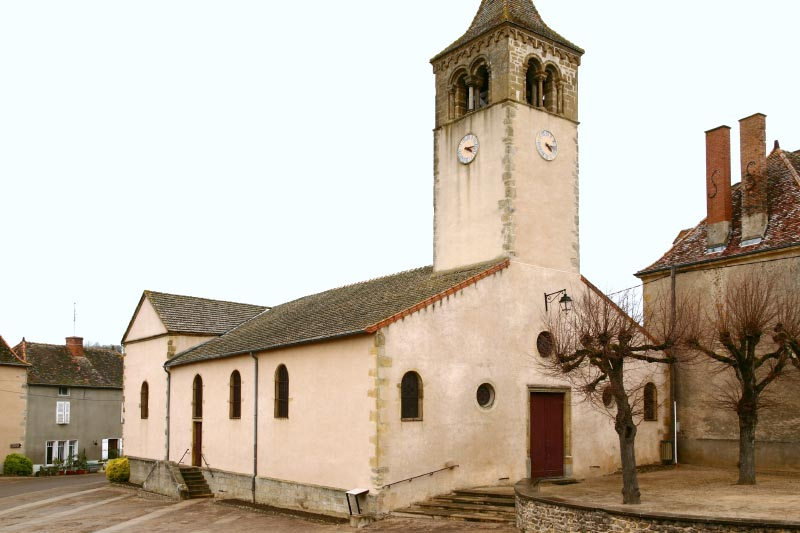 Vue générale de l'église prise du sud-est